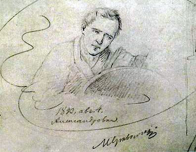 Міхал Грабовський. Портрет. Папір, олівець.